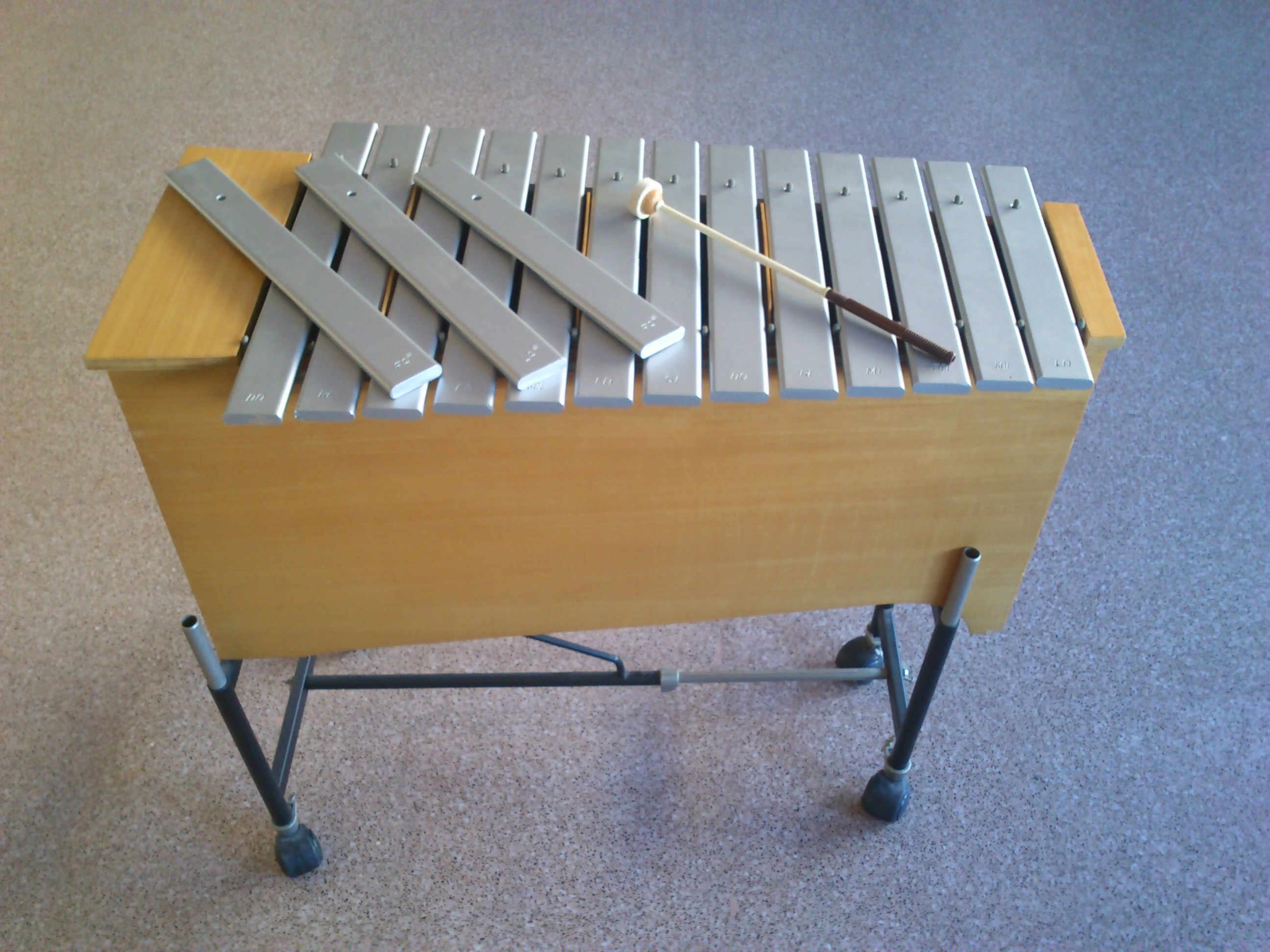 Metalófono para uso escolar. Cuenta con placas que pueden retirarse, cambiarse de lugar, etc.